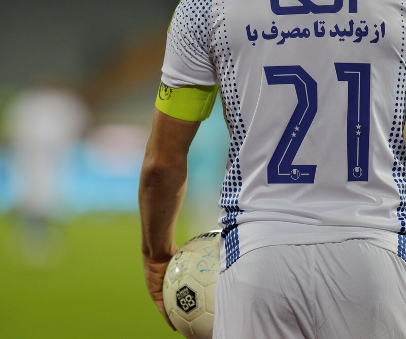 تیم فوتبال استقلال تهران عصر دوشنبه ۱۸ آذر ۱۳۹۸ در هفته چهاردهم لیگ برتر فوتبال باشگاه فوتبال ایران، در ورزشگاه آزادی با نتیجه تساوی 2 بر 2 مقابل تیم پیکان متوقف شد. (گزارش کامل بازی)